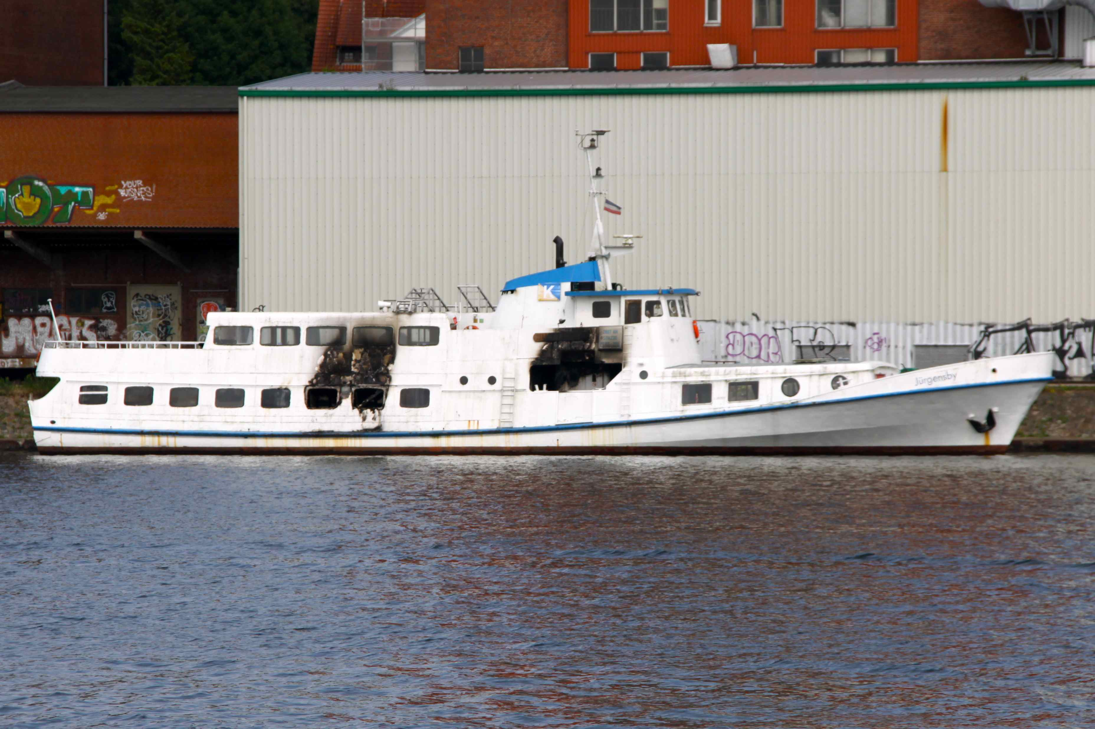 Die ausgebrannte "Jürgensby" am 7. Juli 2017 in Flensburg